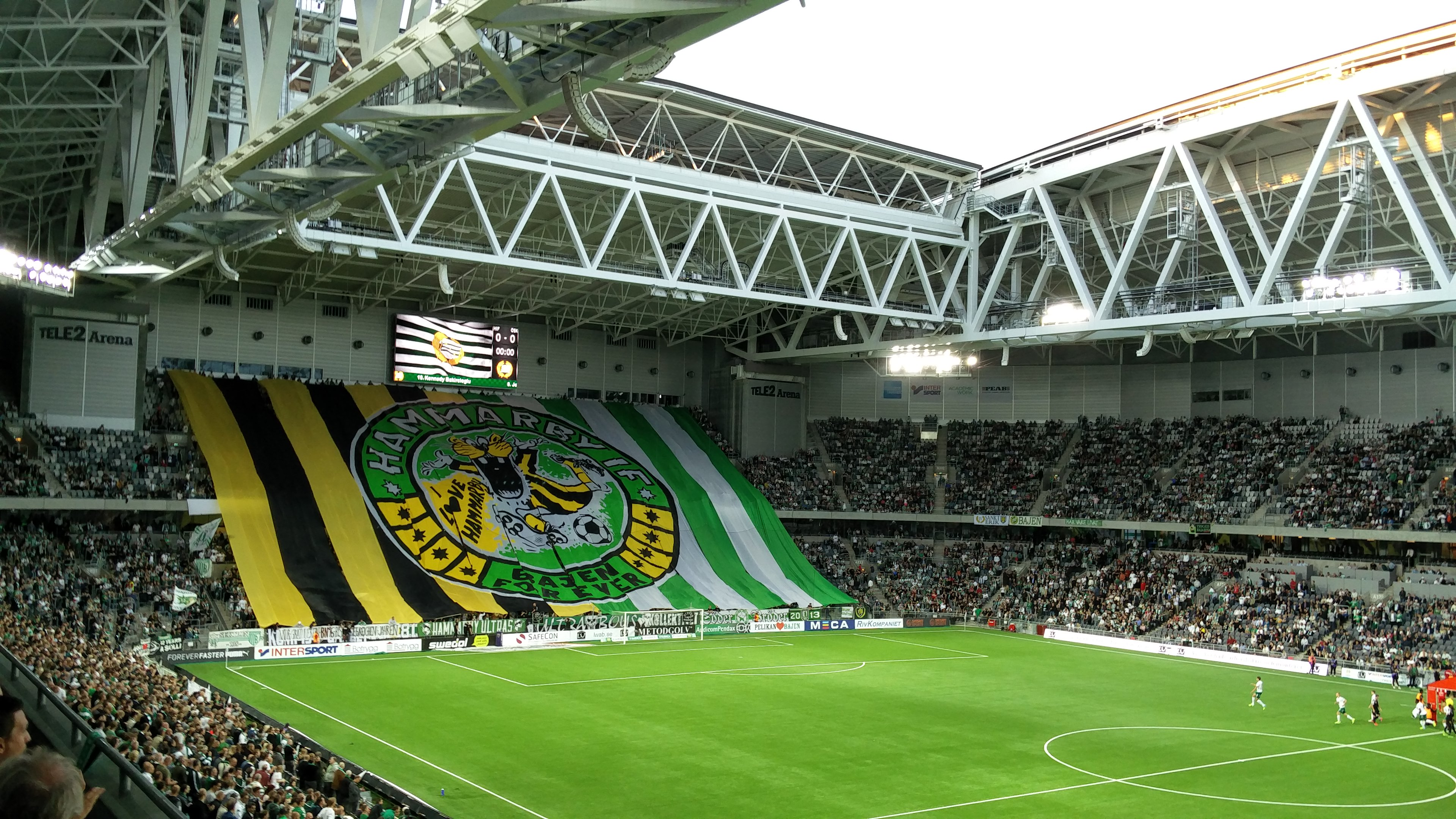 Hammarby IF:s Tifo mot Örebro SK den 12/9 2016 omgång: 23 Allsvenskan 2016